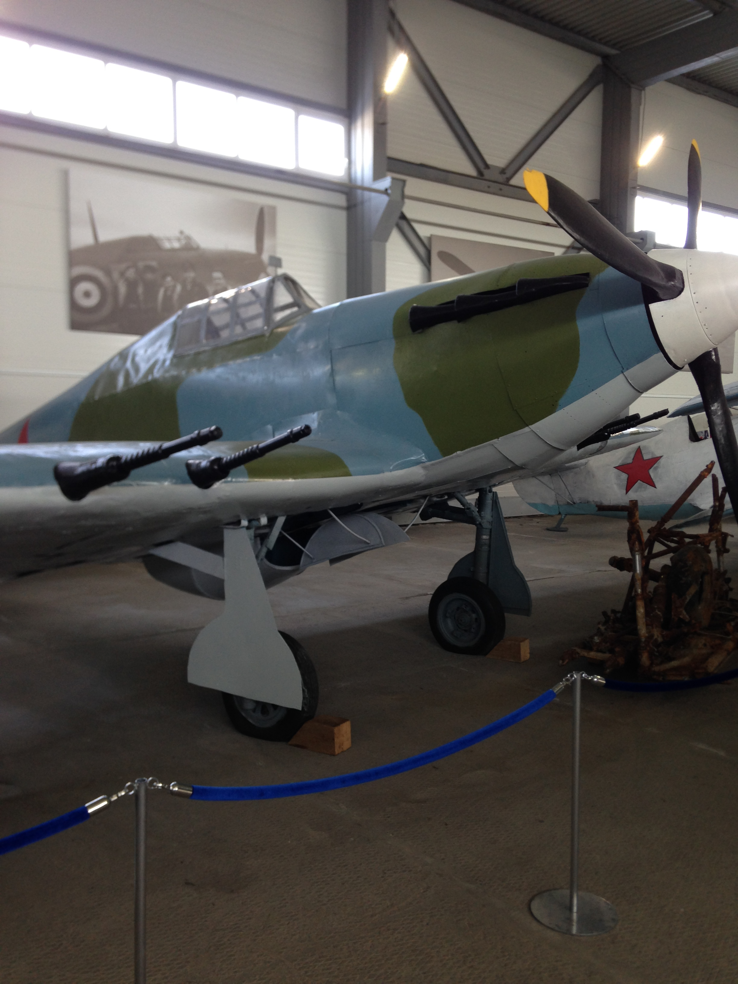 Английский истребитель Хаукер «Харрикейн» - восстановленный макет: Музей ВВС Северного флота, Сафоново, ЗАТО Североморск, Мурманская область